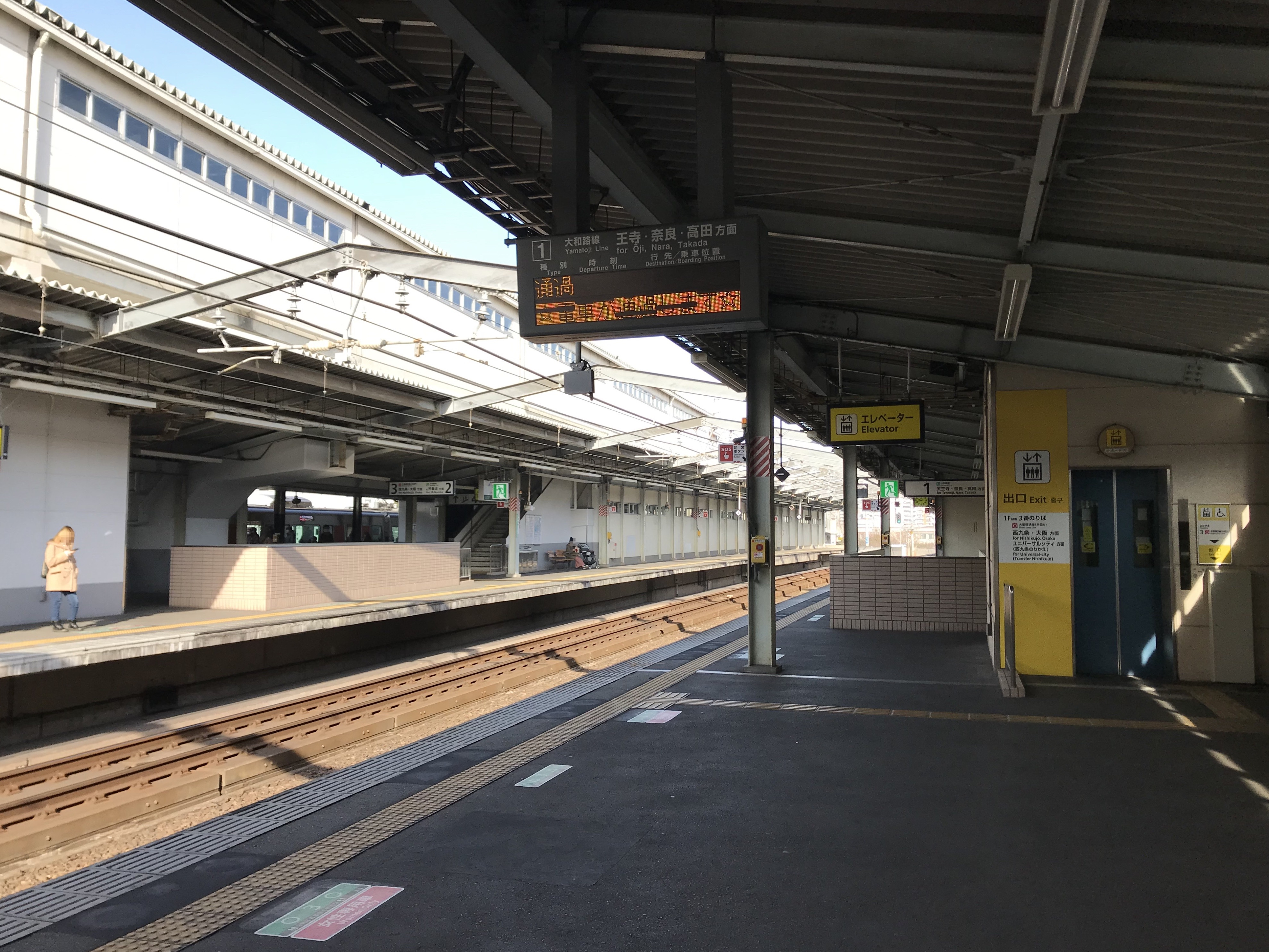 今宮駅の関西本線ホーム(奥はJR難波方面)